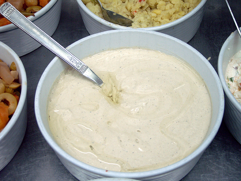 Tahina-Soße)